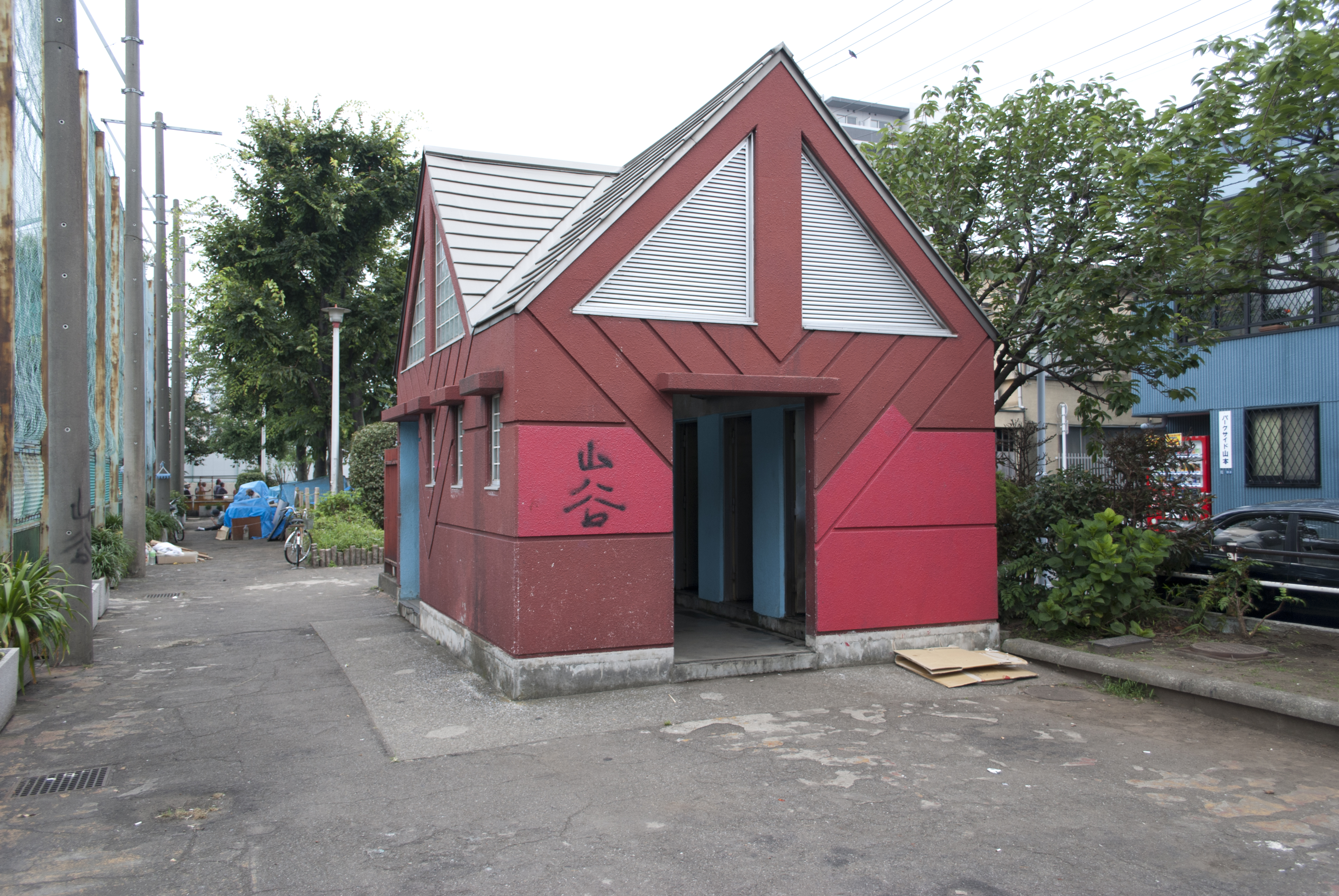 東京都台東区清川2-13-18_玉姫公園_公衆便所